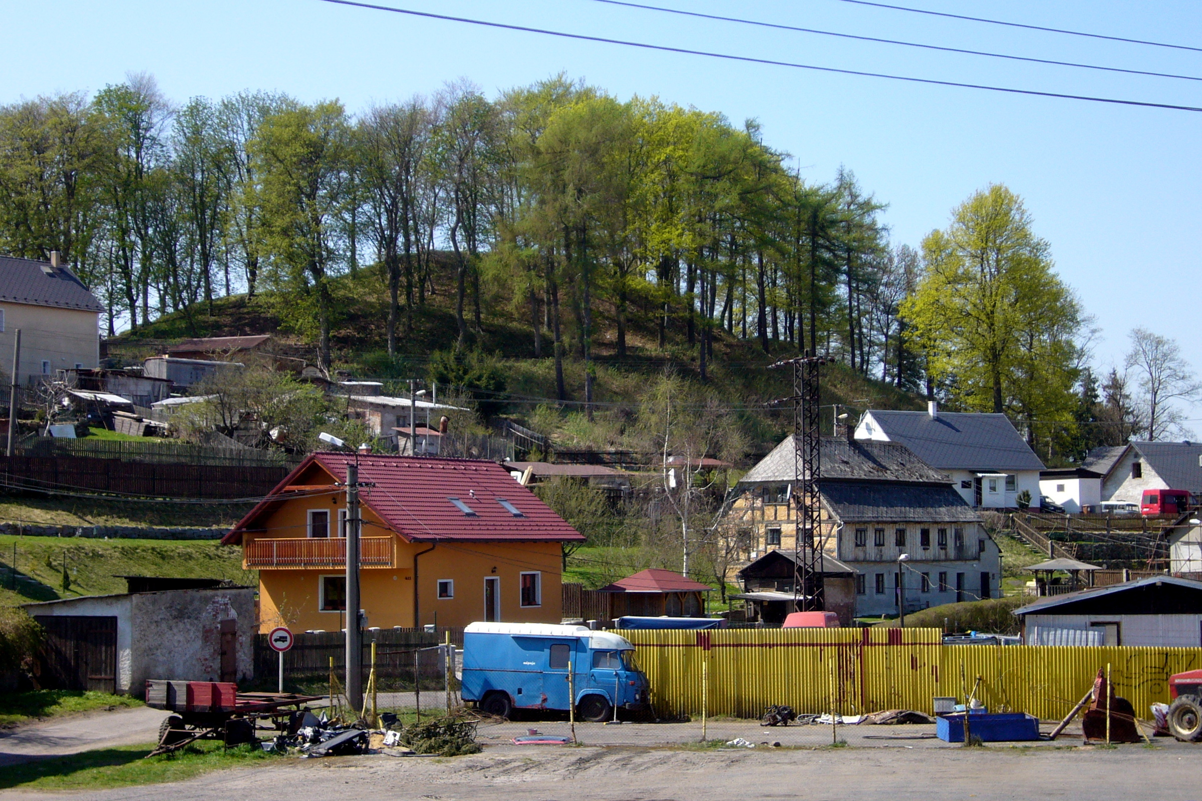 Vrch Hungerberg s terénními relikty hradu